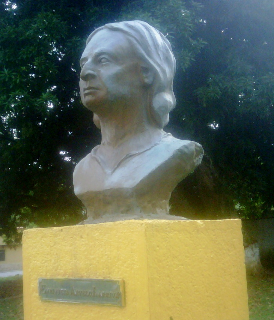 Busto de Enriqueta Arvelo en la Plaza Los Arvelo de Barinitas